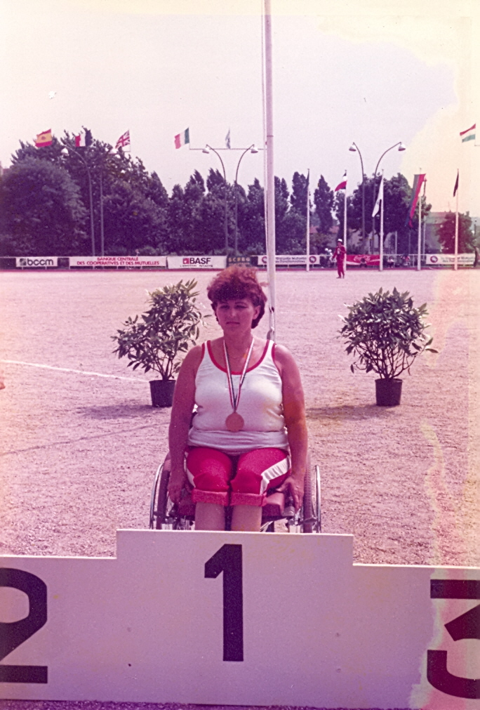 Barbara Tomaszewska podczas dekoracji